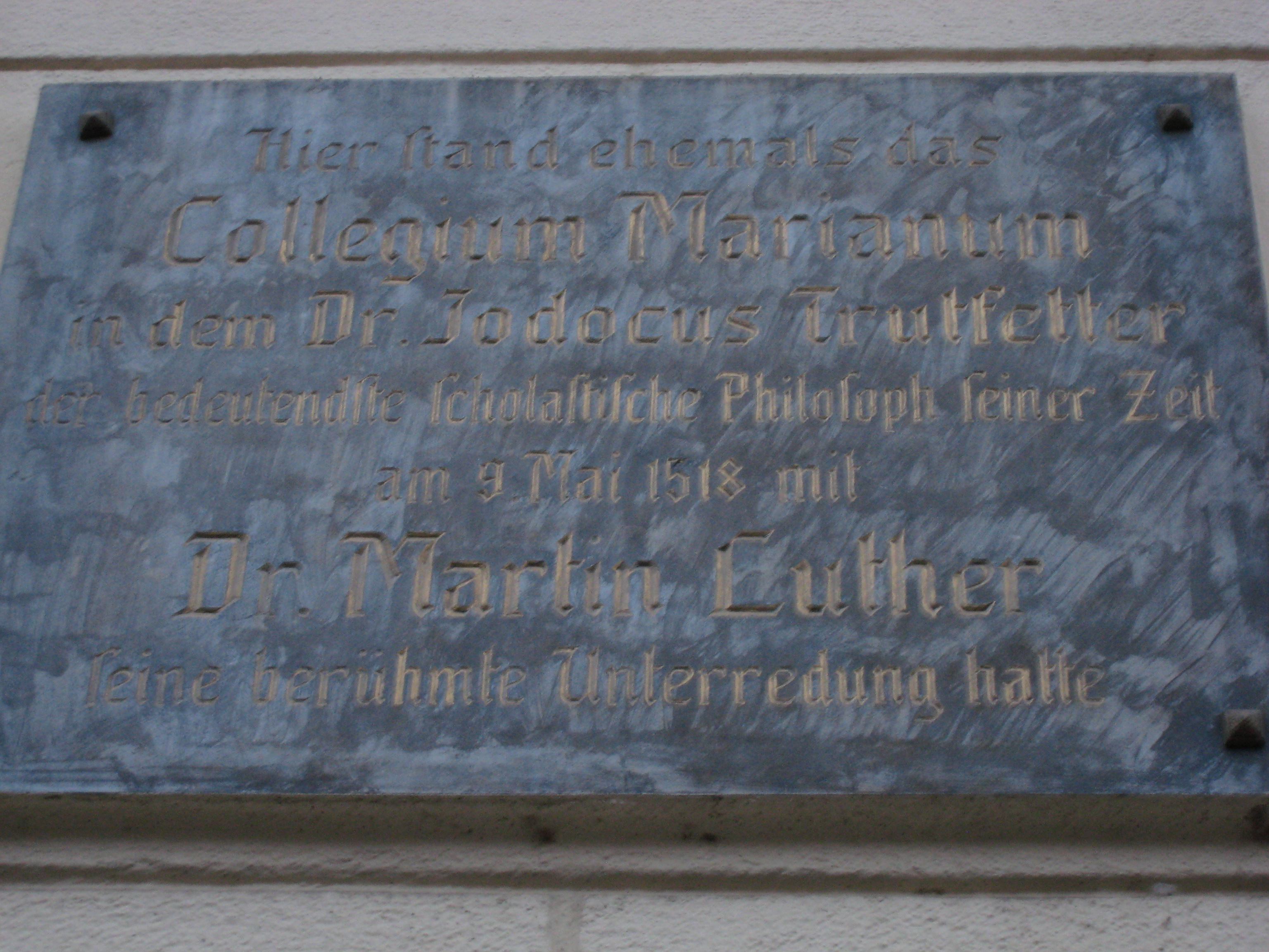 Inschrift am Collegium Marianum Erfurt, Mainzerhofstraße 11